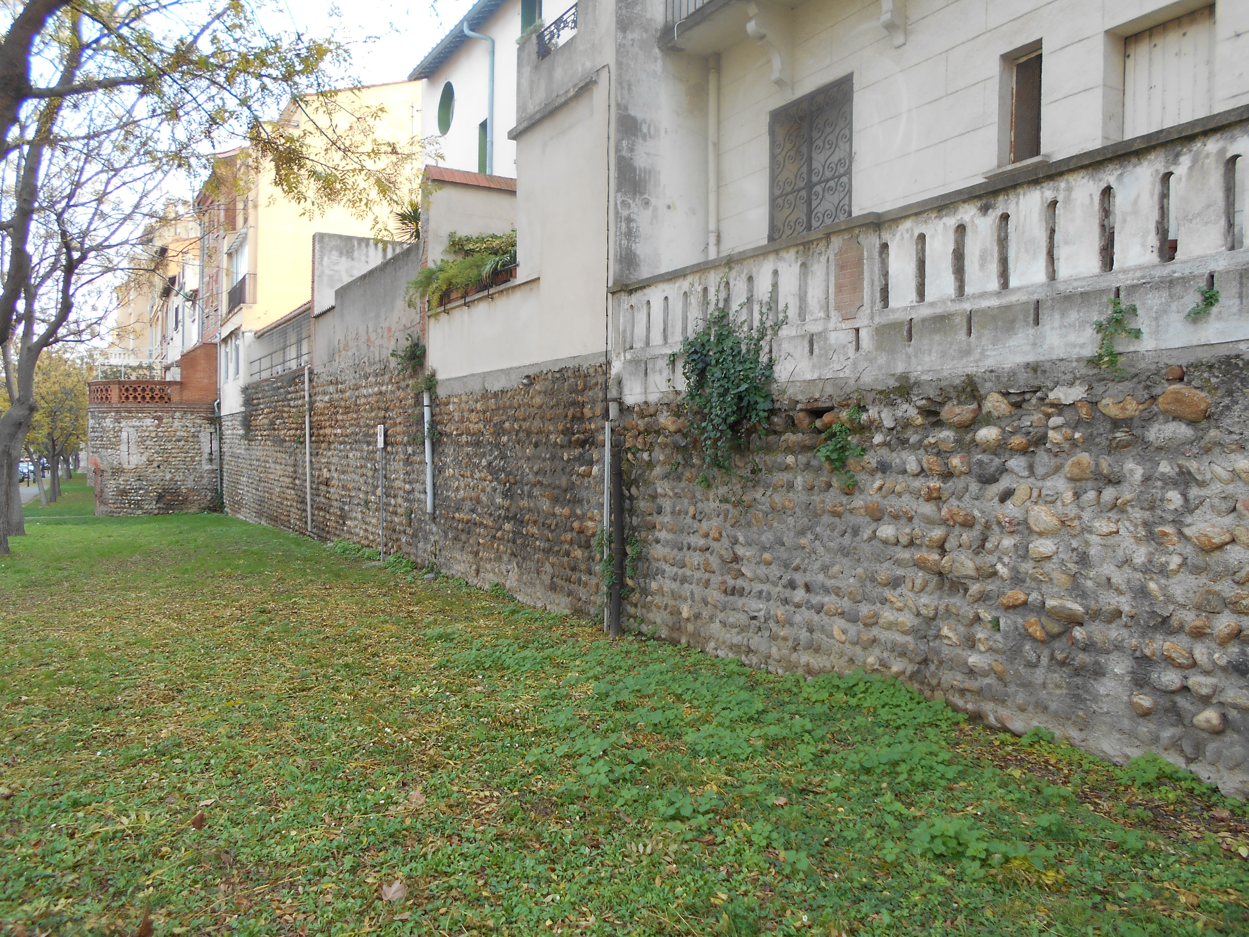 Muralla de Perpinyà de vers el 1300